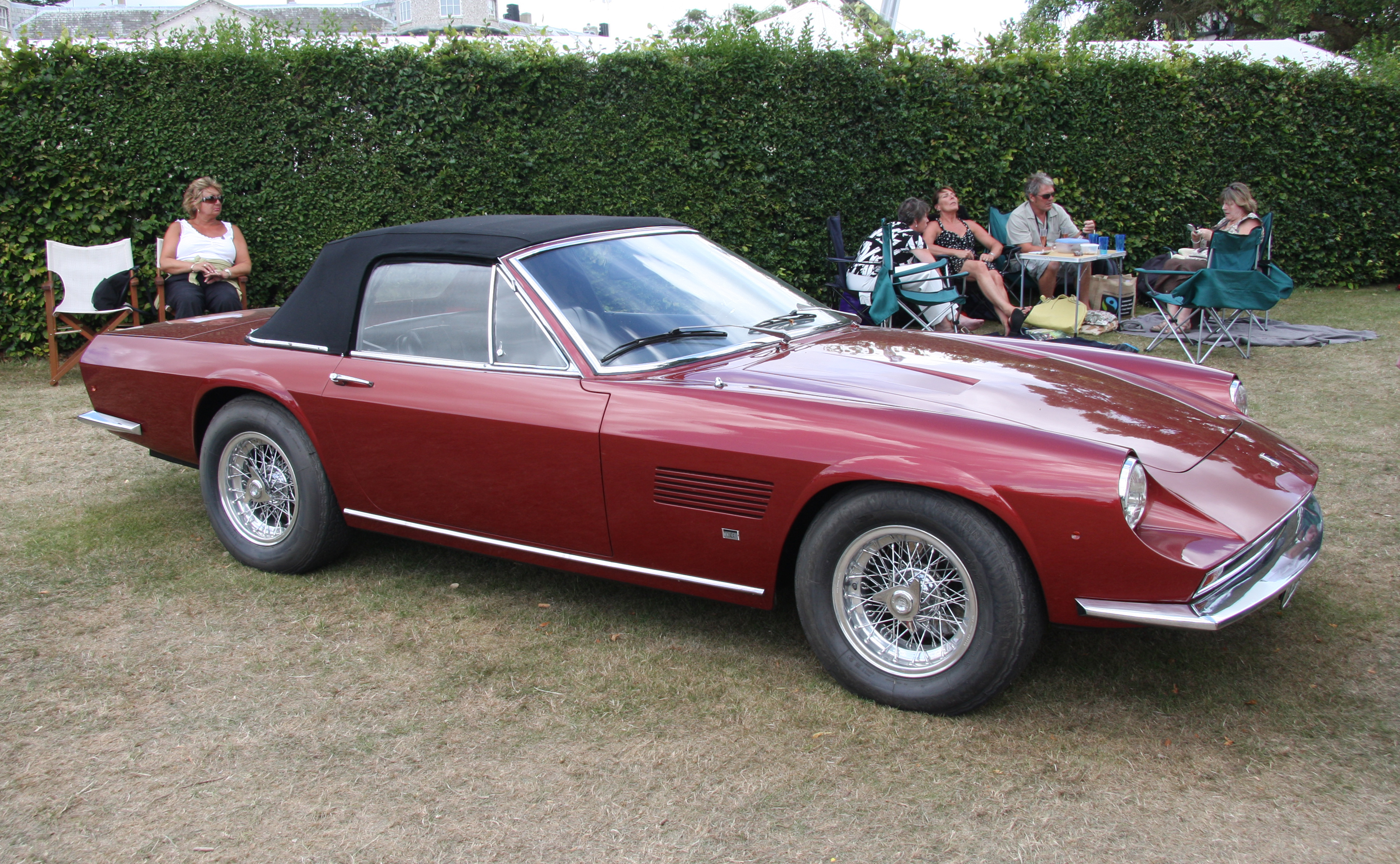 Goodwood 2009